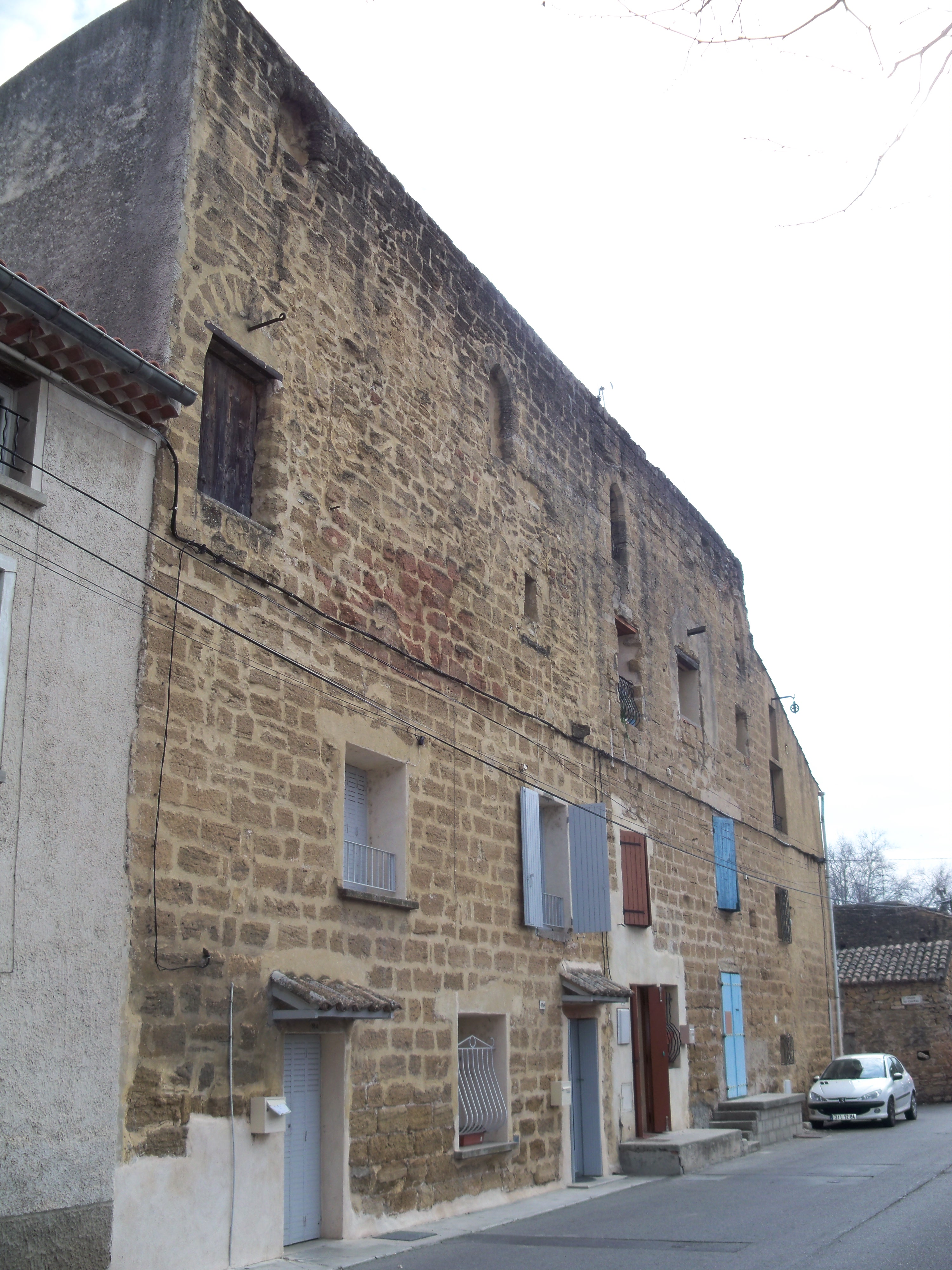 Façade du palais des papes de Sorgues en 2013